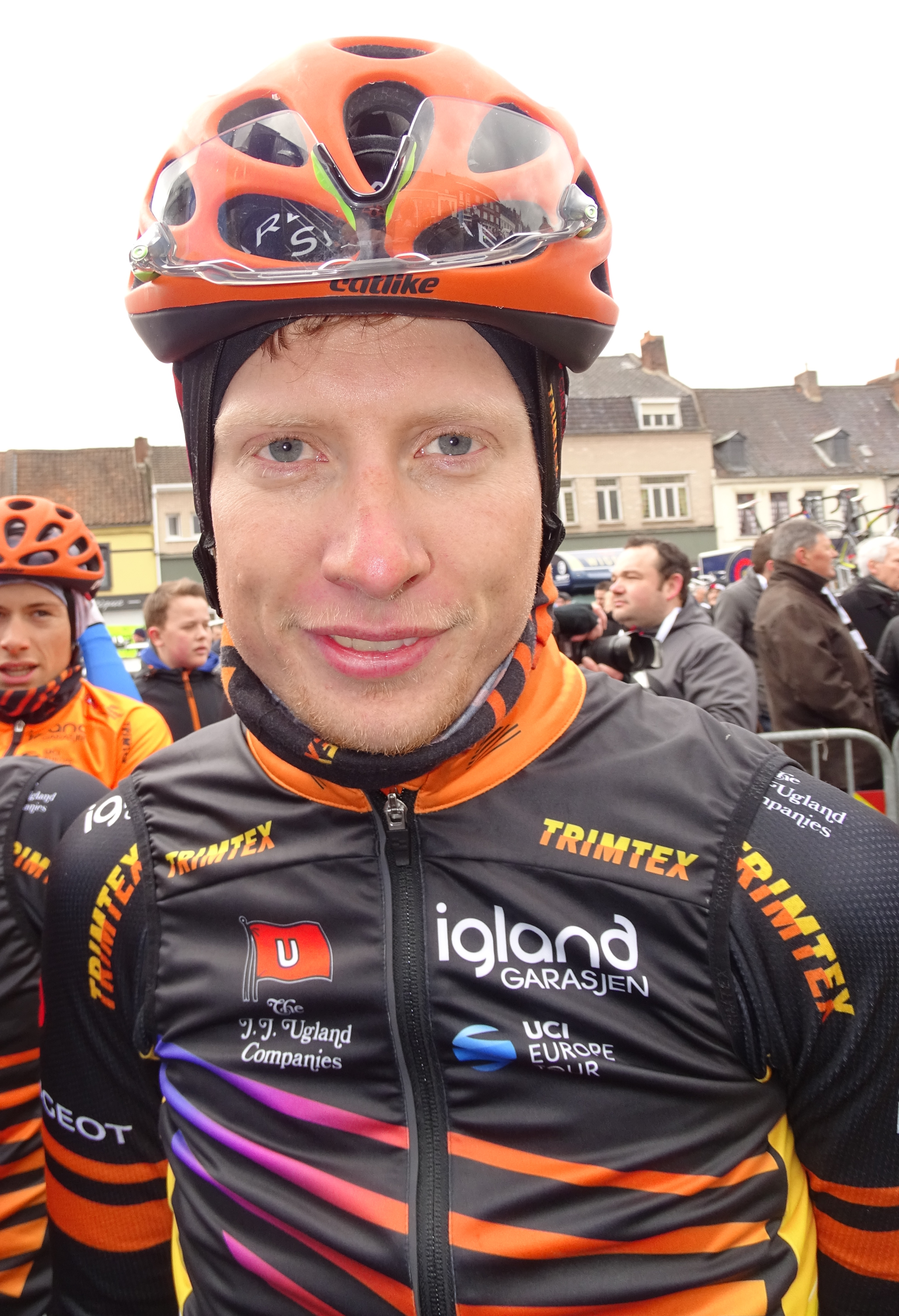 Reportage réalisé le dimanche 6 mars à l'occasion du départ et de l'arrivée du Grand Prix de Lillers-Souvenir Bruno Comini 2016 à Lillers, Pas-de-Calais, Nord-Pas-de-Calais, France.